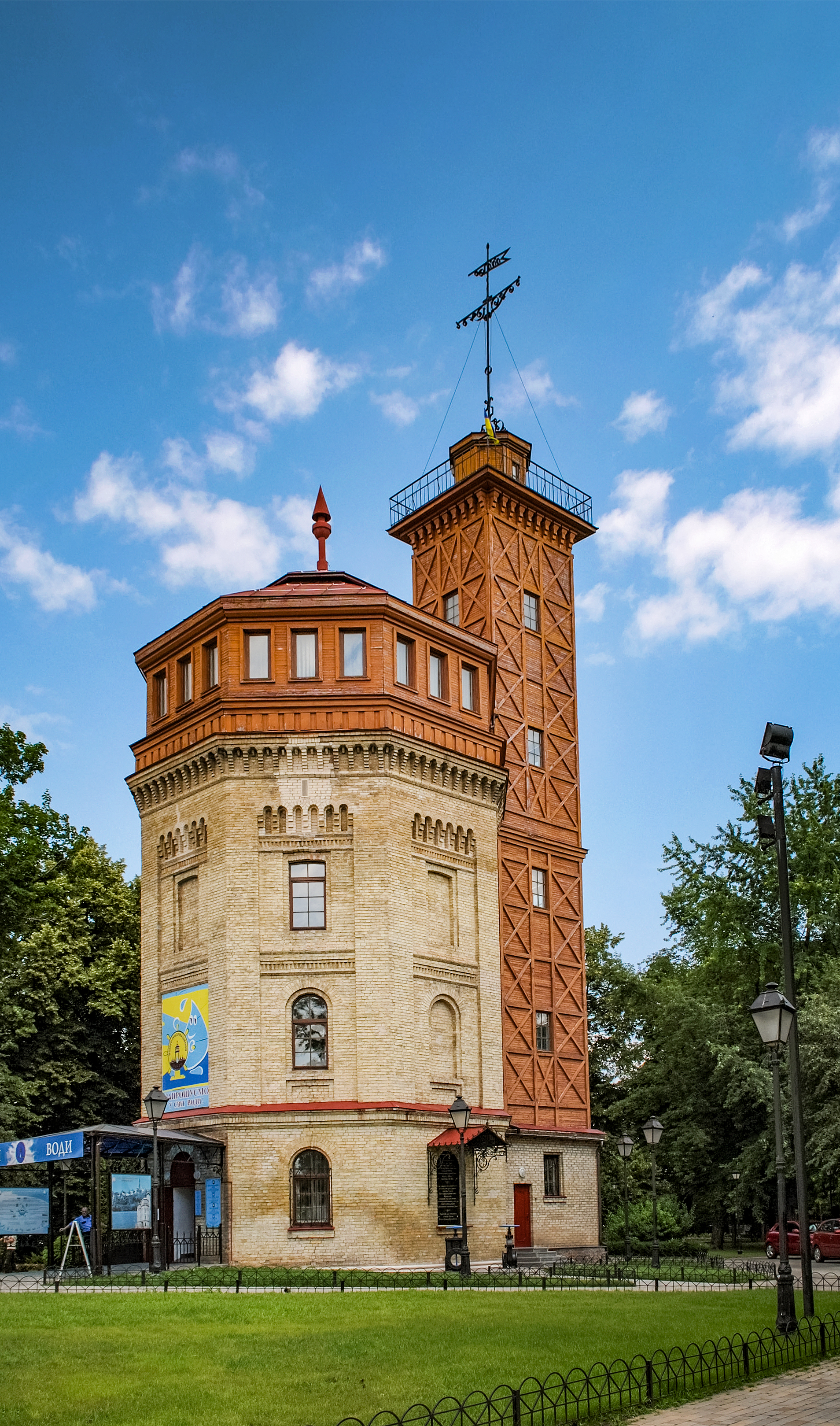 Вежа водогінна з підземним резервуаром (Водонапірна башта), Київ, :uk:Хрещатий парк, Грушевського Михайла вул.